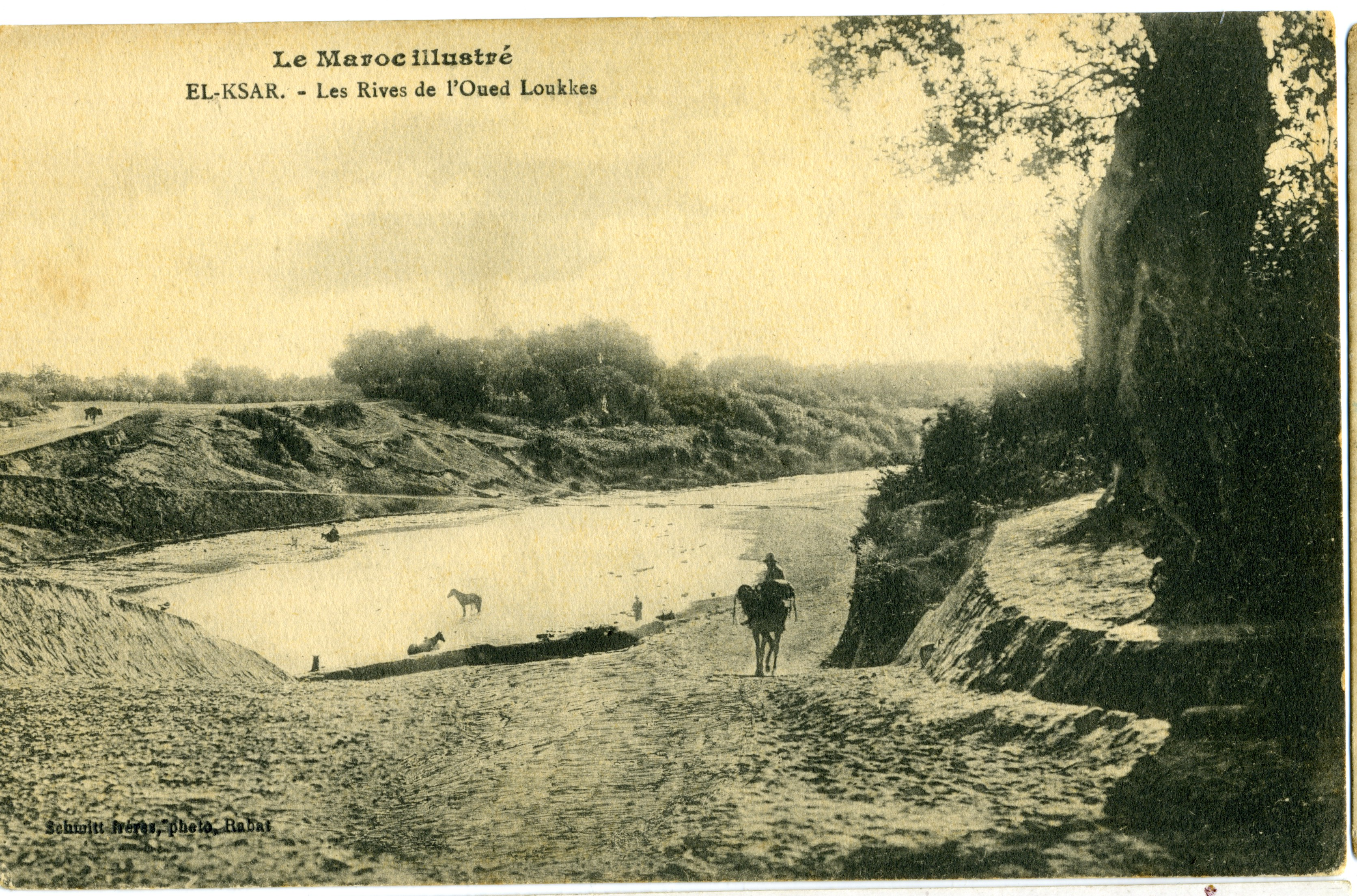 Carte postale de Ksar El-Kébir, les rives de l'oued Loukkos, Maroc